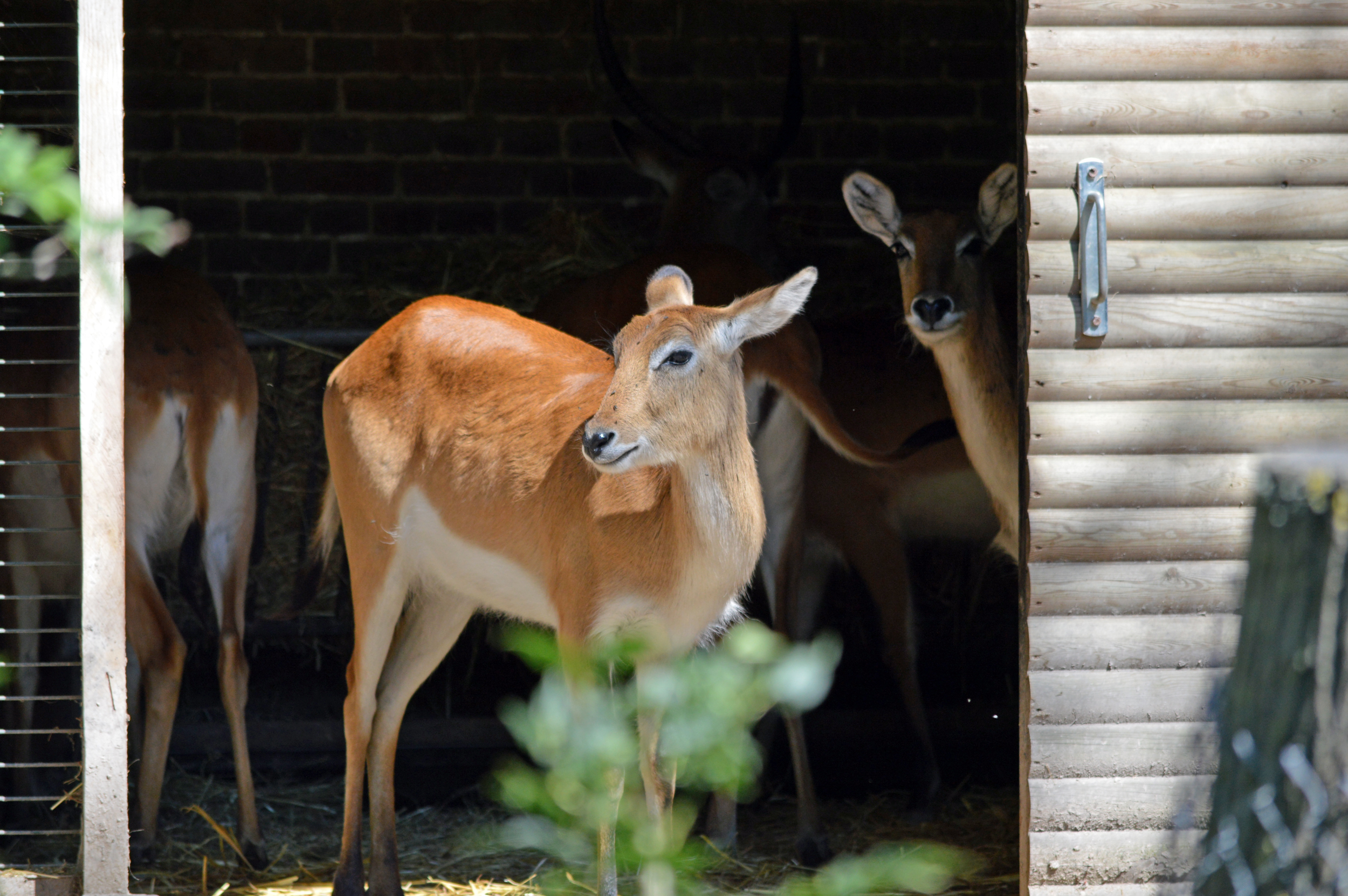 Cobe de Lechwe (Zoo-Amiens)